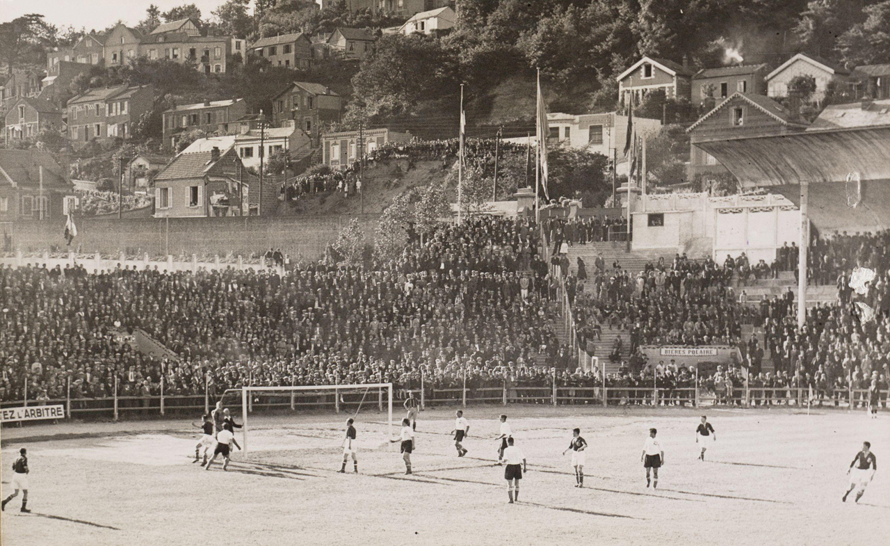 Nationaal Archief Beschrijving: Spelmoment uit de wedstrijd tegen Tsjechoslowakije. De Tsjechoslowaakse doelman maakt een Nederlandse aanval onschadelijk. Tsjechoslowakije - Nederland (0-3, na verlenging), gespeeld op 5 juni 1938 in het Stade Municipal in Le Havre tijdens de Wereldkampioenschappen. Datum: 5 juni 1938 Vervaardiger: fotograaf onbekend Bestanddeelnummer: 3929 URL: Voor meer informatie over het Nationaal Archief: Voor meer foto's uit deze en andere collecties, bezoek onze Beeldbank:, U kunt ons helpen onze kennis van de fotocollecties te verrijken door tags en commentaren toe te voegen. Herkent u mensen of locaties of heeft u een bijzonder verhaal te vertellen bij één van de foto's, laat dan een reactie achter (als u ingelogd bent bij Flickr) of stuur een mailtje naar